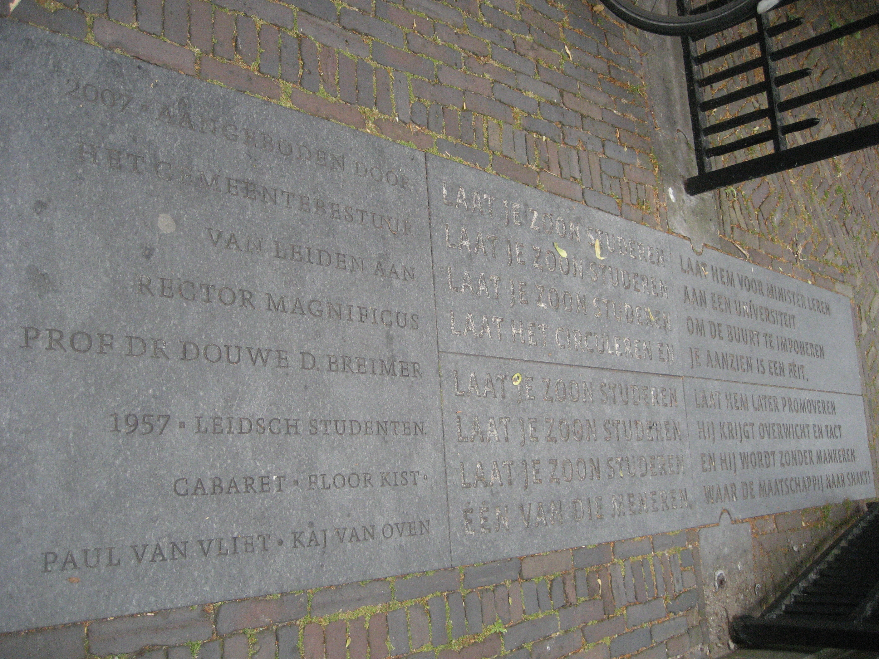 Tekst van Leids studentencabaret ("Laat je zoon studeren", tekst Floor Kist, muziek Kaj van Oven) in steen. Rapenburg, Leiden (Nederland)